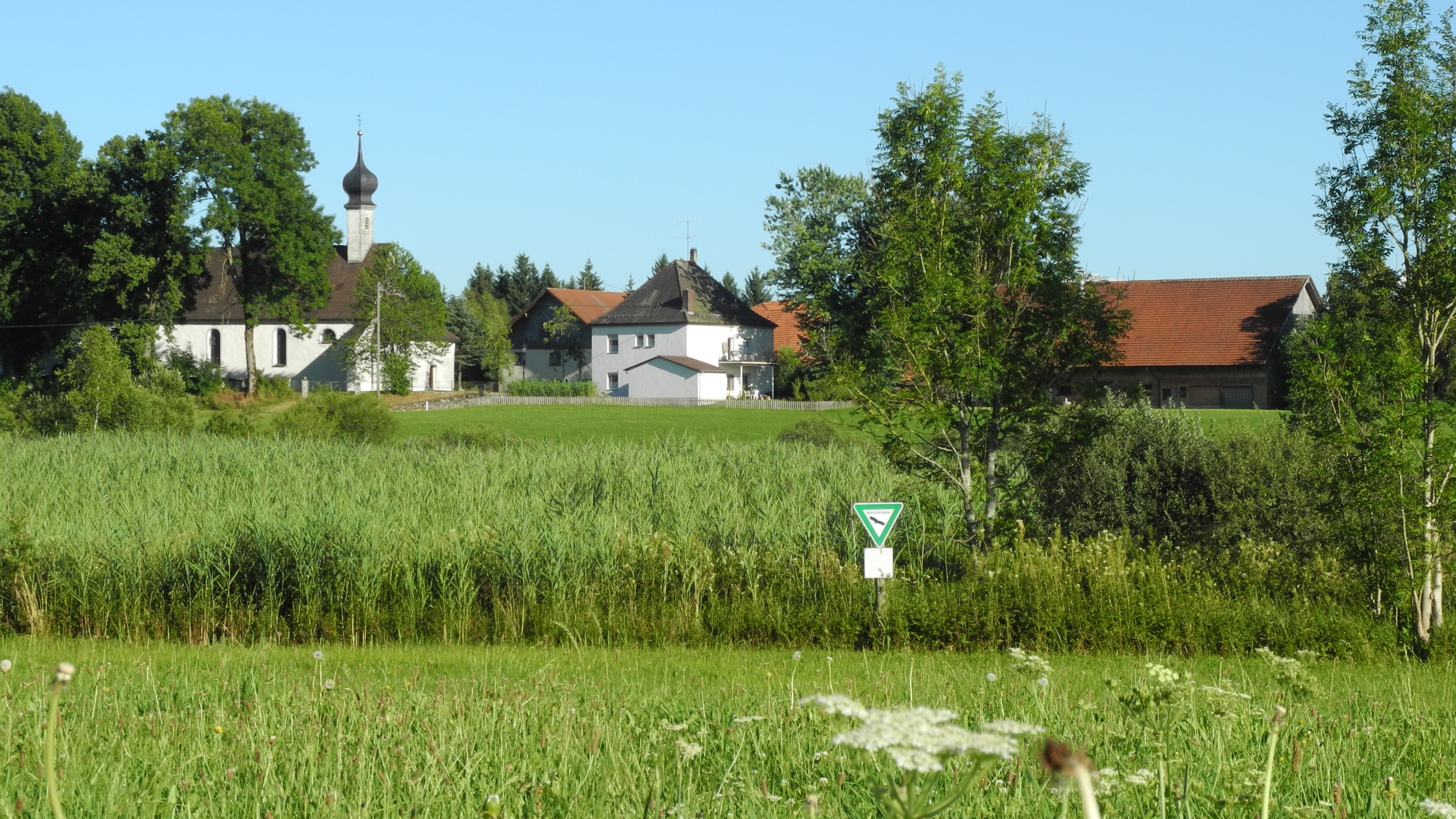 Kißlegg - Ortslage Rötsee, Kapelle und im Vordergrund ein Teil des Naturschutzgebiets „Gründlenried-Rötseemoos“